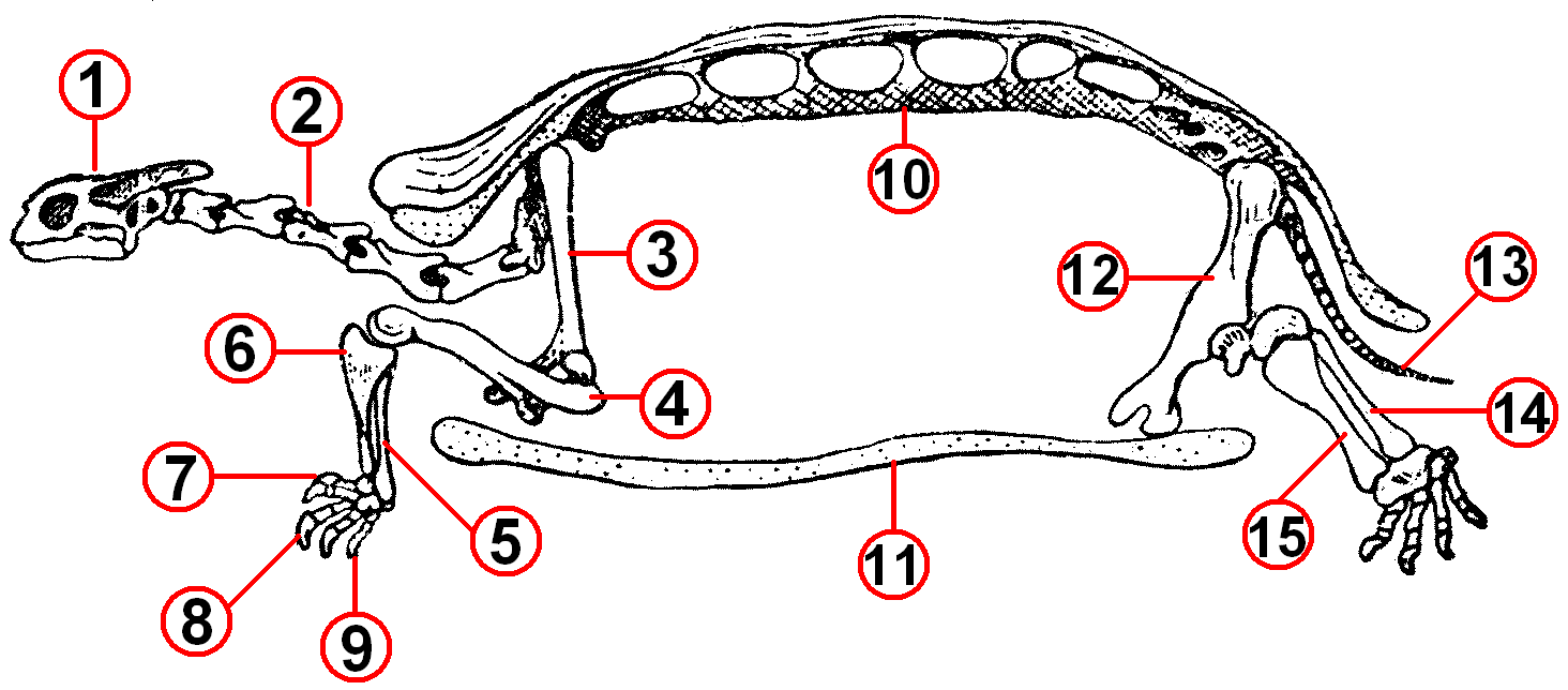 Skeleton of Testudo tortoise, tagged